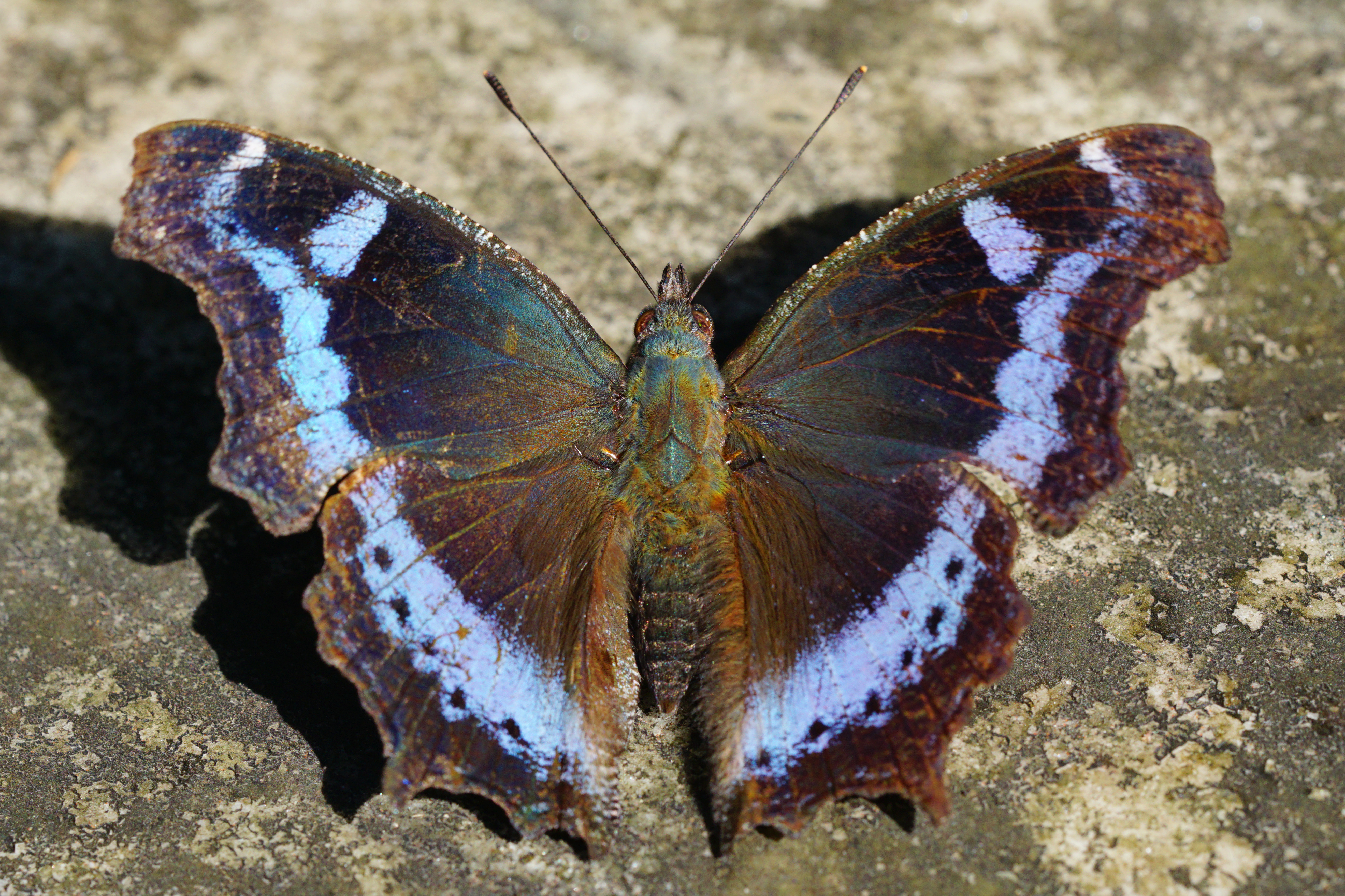 琉璃蛺蝶 Kaniska canace drilon